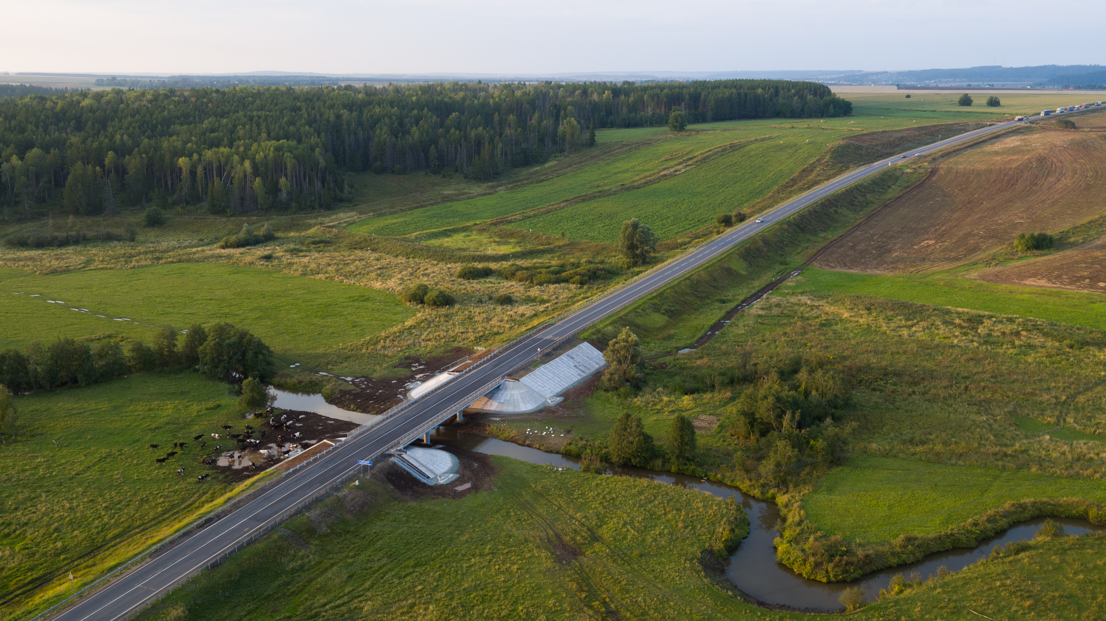 М-7 «Волга», подъезд к Ижевску, 42 км, мост через реку Колтымак